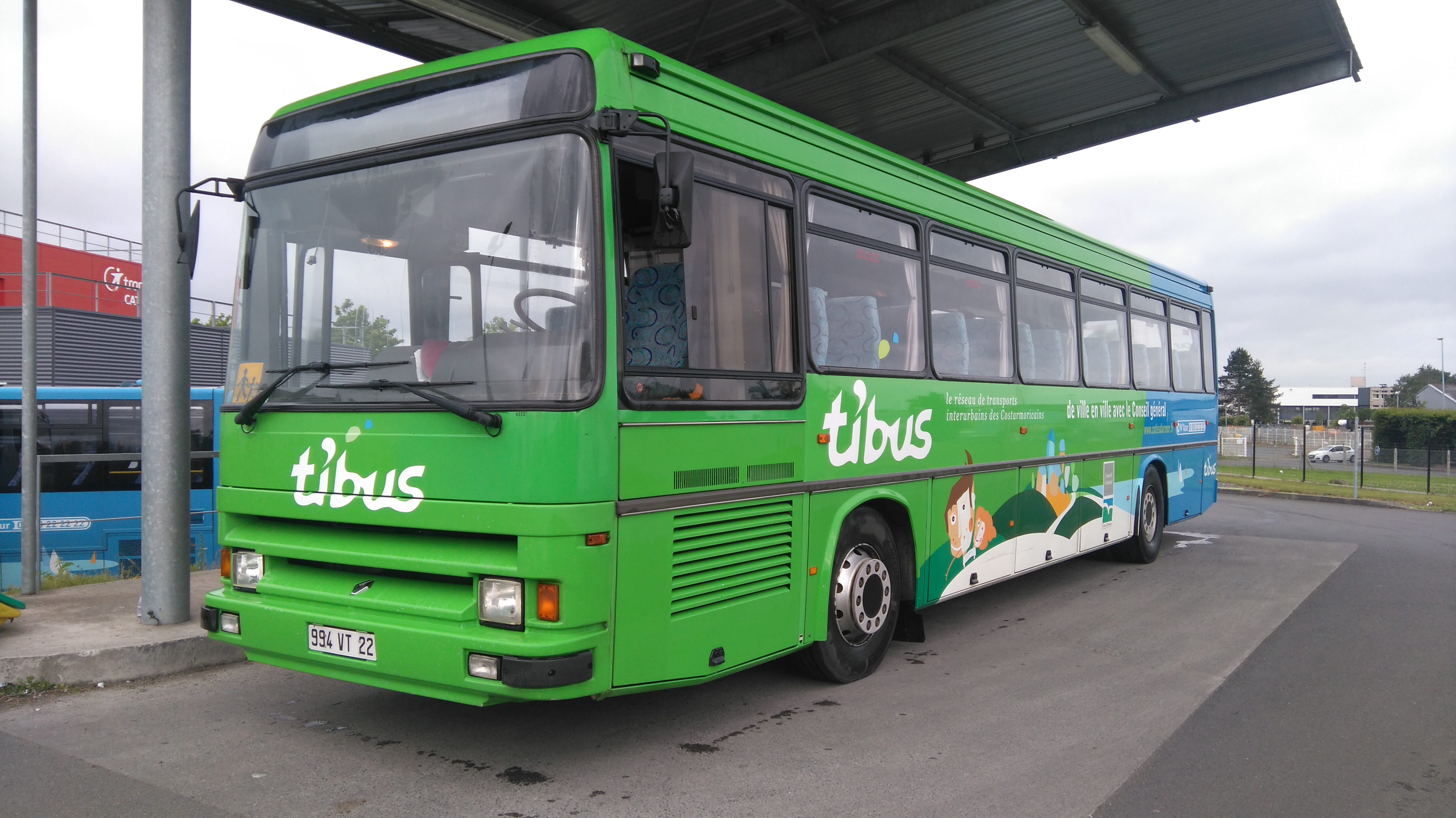 Renault Tracer Ti'Bus